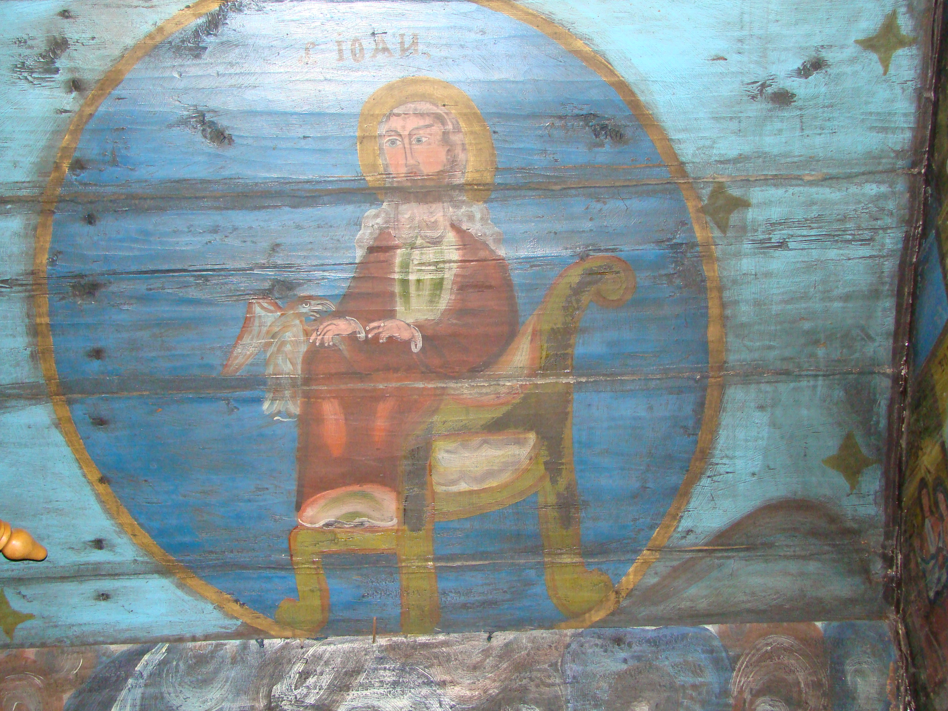 Biserica de lemn din Poiana Botizii-interioare